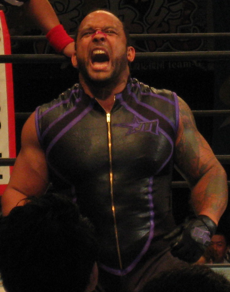 2011年6月18日 大阪府立体育会館 「DOMINION6.18」 MVP